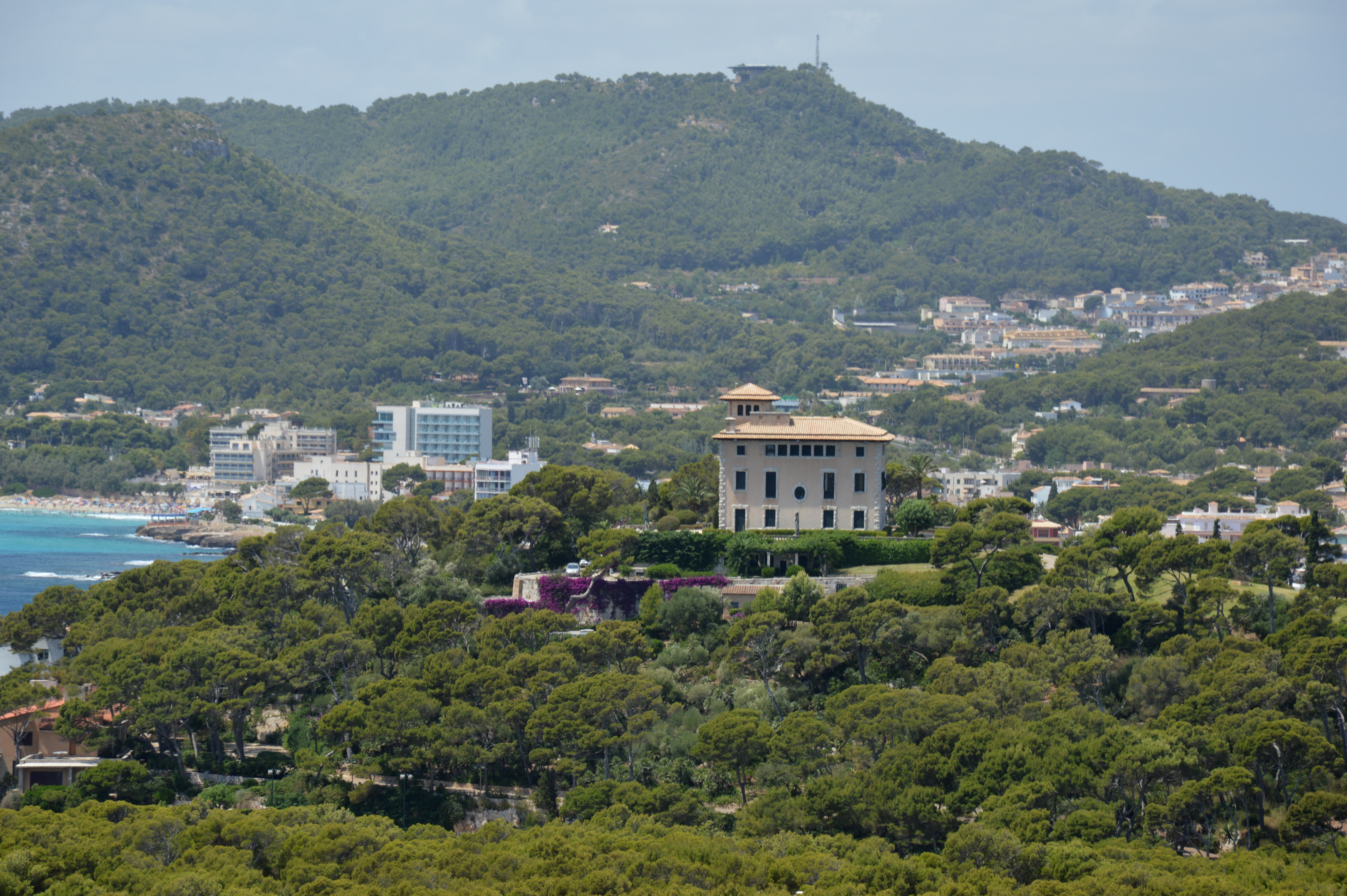 Villa March in Cala Rajada, Blick vom Bereich um den Leuchtturm